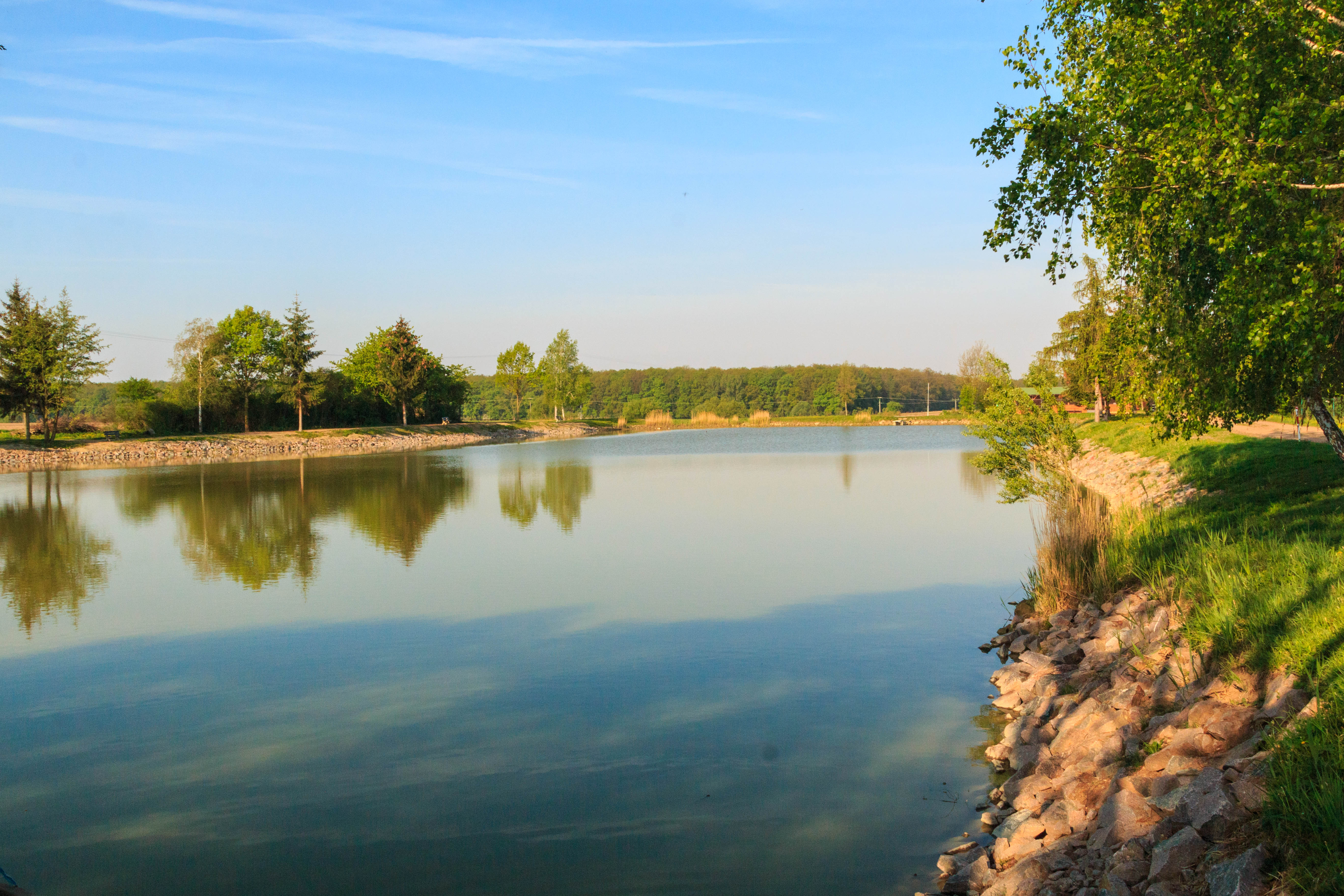 Rybník Močidlo u Lodína Project: Vodstvo.